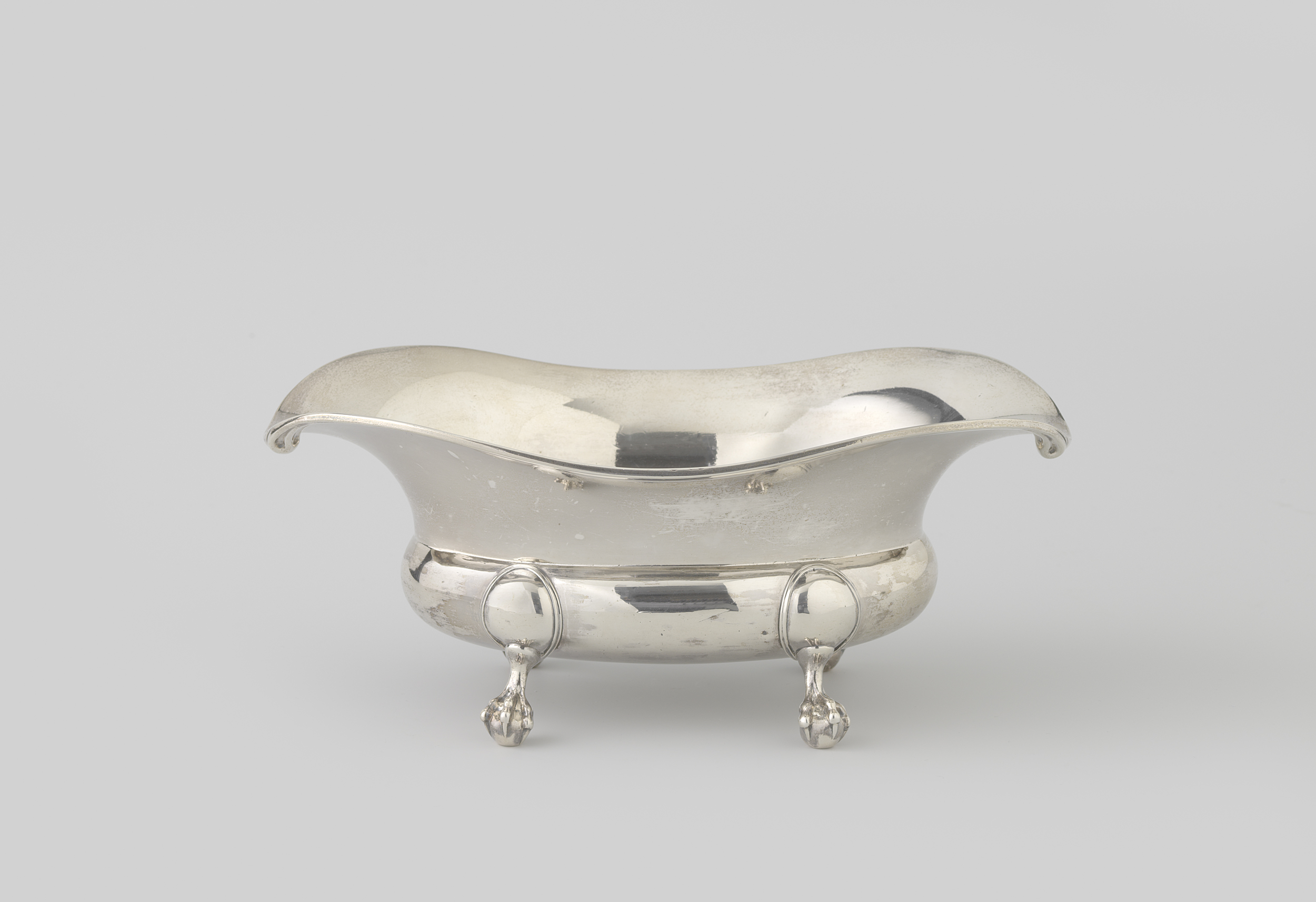 IdentificatieTitel(s): Sauskom, ovaal, op vier klauwpotenObjecttype: sauskom Objectnummer: BK-1973-12Opschriften / Merken: kantoorteken, onderzijde bodem, afgeslagen: (Kantoorteken Amsterdam.)gehalteteken, onderzijde bodem, afgeslagen: Hollandse leeuwjaarletter, onderzijde bodem, afgeslagen: ‘E’ (1789)meesterteken, onderzijde bodem, afgeslagen: AHP in rechthoek (lijst 1798, nr. [97], lijst 1807, nr. 26 = Voet 1912, nrs. 500, 502, 501; Citroen 1975, nrs. 36, 37) (Anton Hinrich Pape.)herkeur, onderzijde bodem, afgeslagen: ‘ZI’ (Sedert 1953.)Omschrijving: De ovale kom rust op vier poten in de vorm van een vogelklauw op een bol, die ieder met een ovaal, door een profiel omgeven schild tegen een bolle buik bevestigd zijn. Boven de buik rijst het gewelfde, zich verbredende bovengedeelte op, dat aan de zijkanten eerst hoger oploopt om daarna naar beneden te buigen. Langs de bovenzijde van de kom loopt een profielrand, die aan de zijkanten eindigt in lusvormige verdikkingen ter weerszijden van een lip.VervaardigingVervaardiger: zilversmid: Anton Hinrich PapePlaats vervaardiging: AmsterdamDatering: 1789Materiaal: zilver Techniek: gieten / drijvenAfmetingen: h 8,9 cm. × b 21,2 cm. × d 11,6 cm. × g 412,0 grVerwerving en rechtenVerwerving: aankoop 1973Copyright: Pubkiek domein